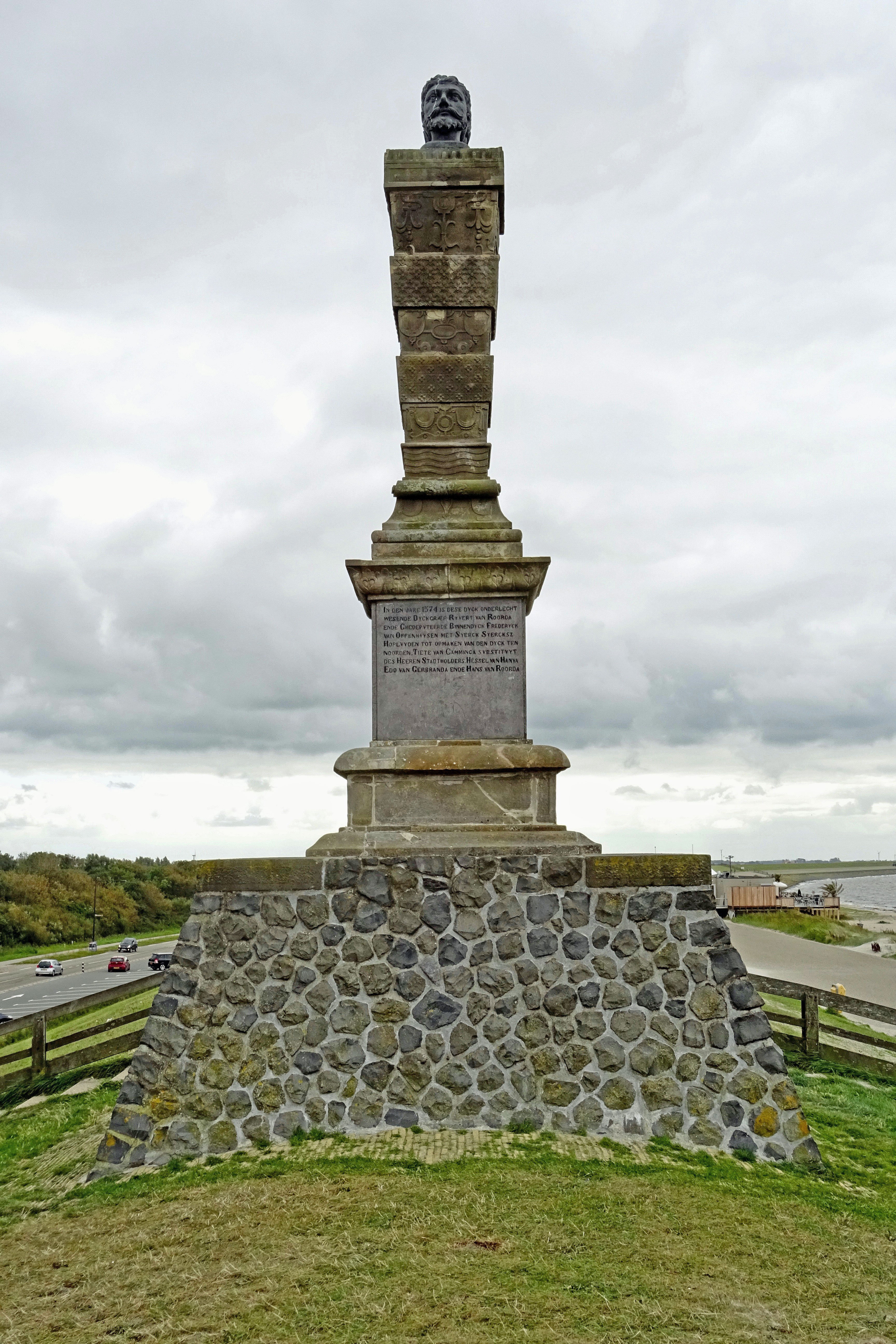 De stenen man, terminus of grenspaal aan de Westerzeedijk